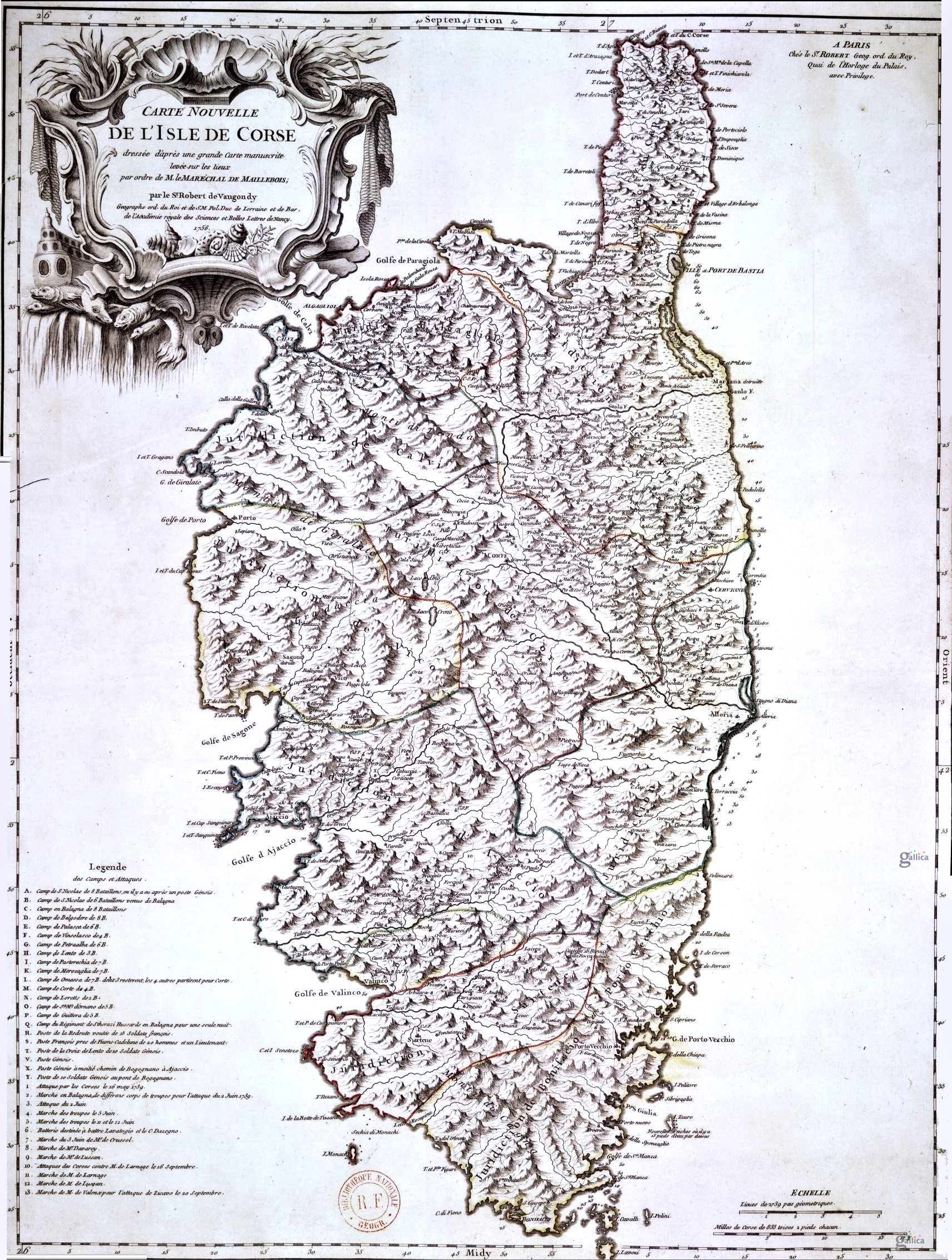 Corse -Carte nouvelle de l'Isle de Corse divisée par ses dix provinces ou juridictions, par Robert de Vaugondy (1756)